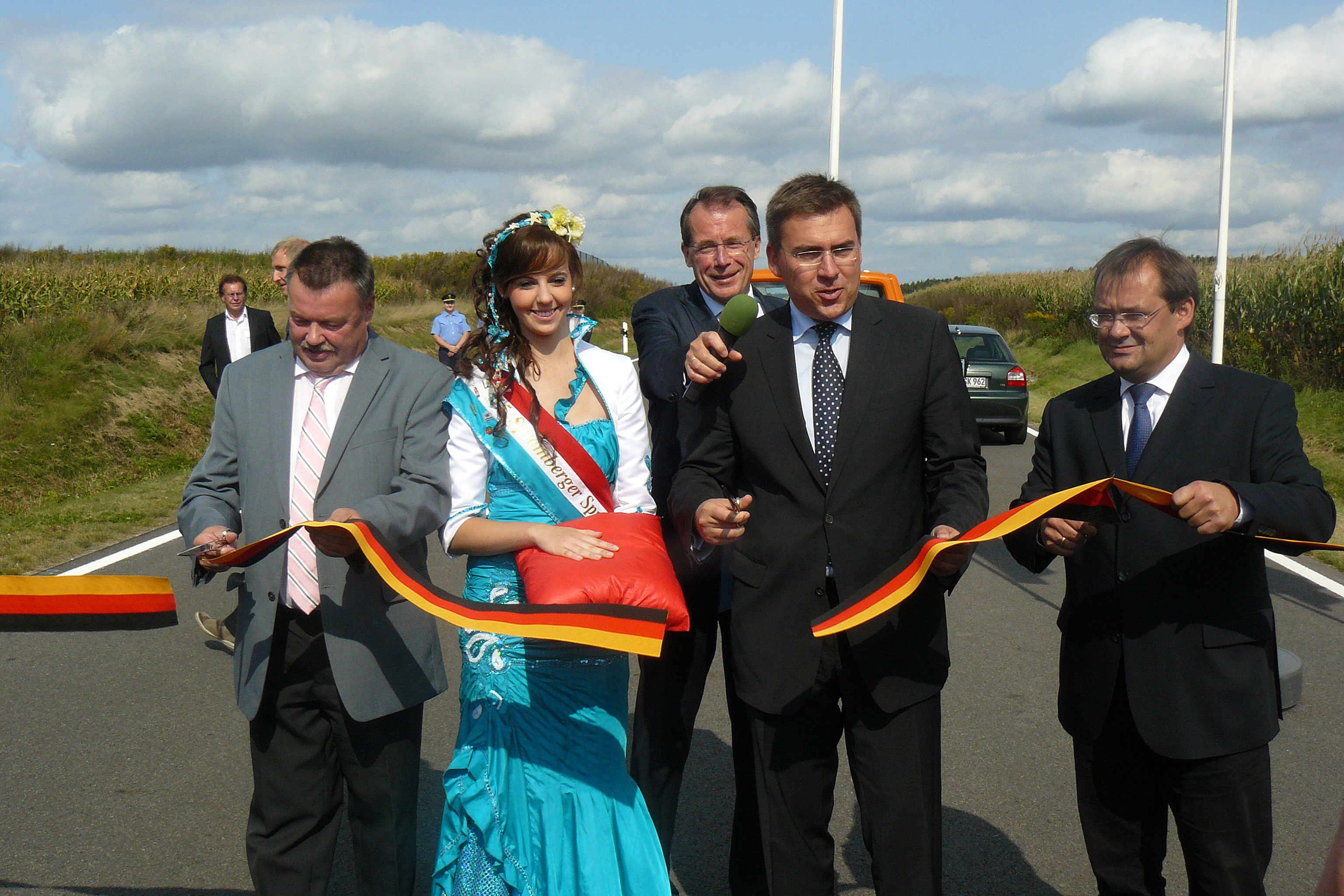 Freigabe Umgehungsstraße B 97n Spremberg, Schwarze Pumpe